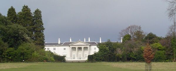 huis van president Ierland - eigen foto